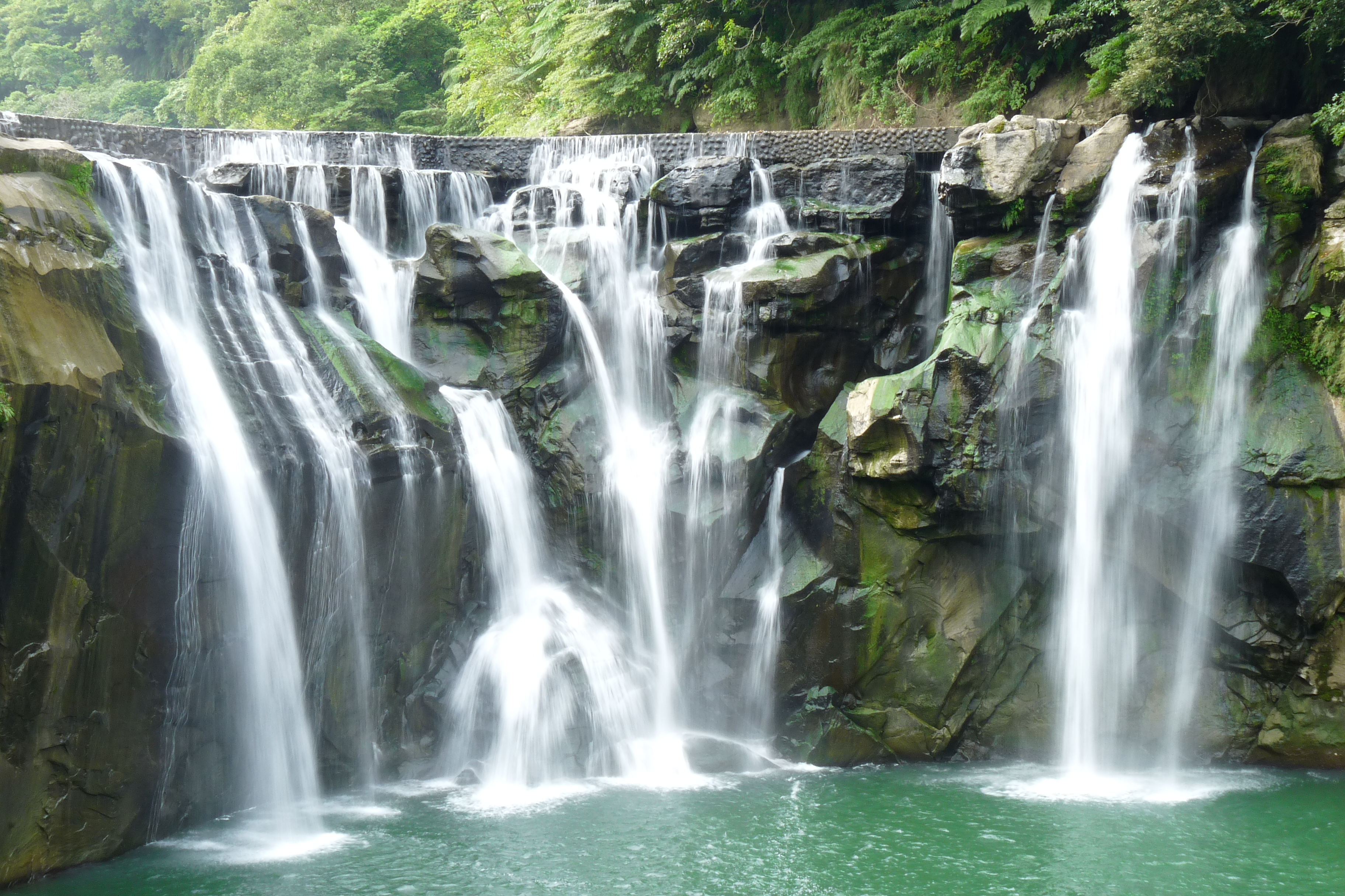 Shifen Waterfall